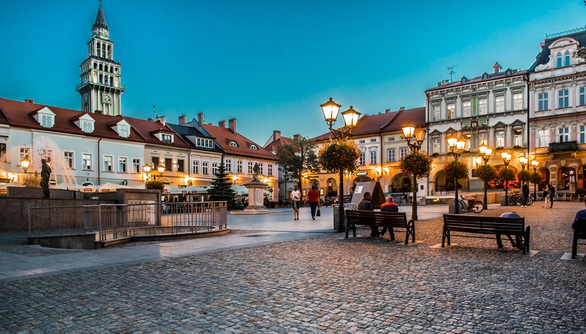 Bielsko-Biała Rynek nocą 2